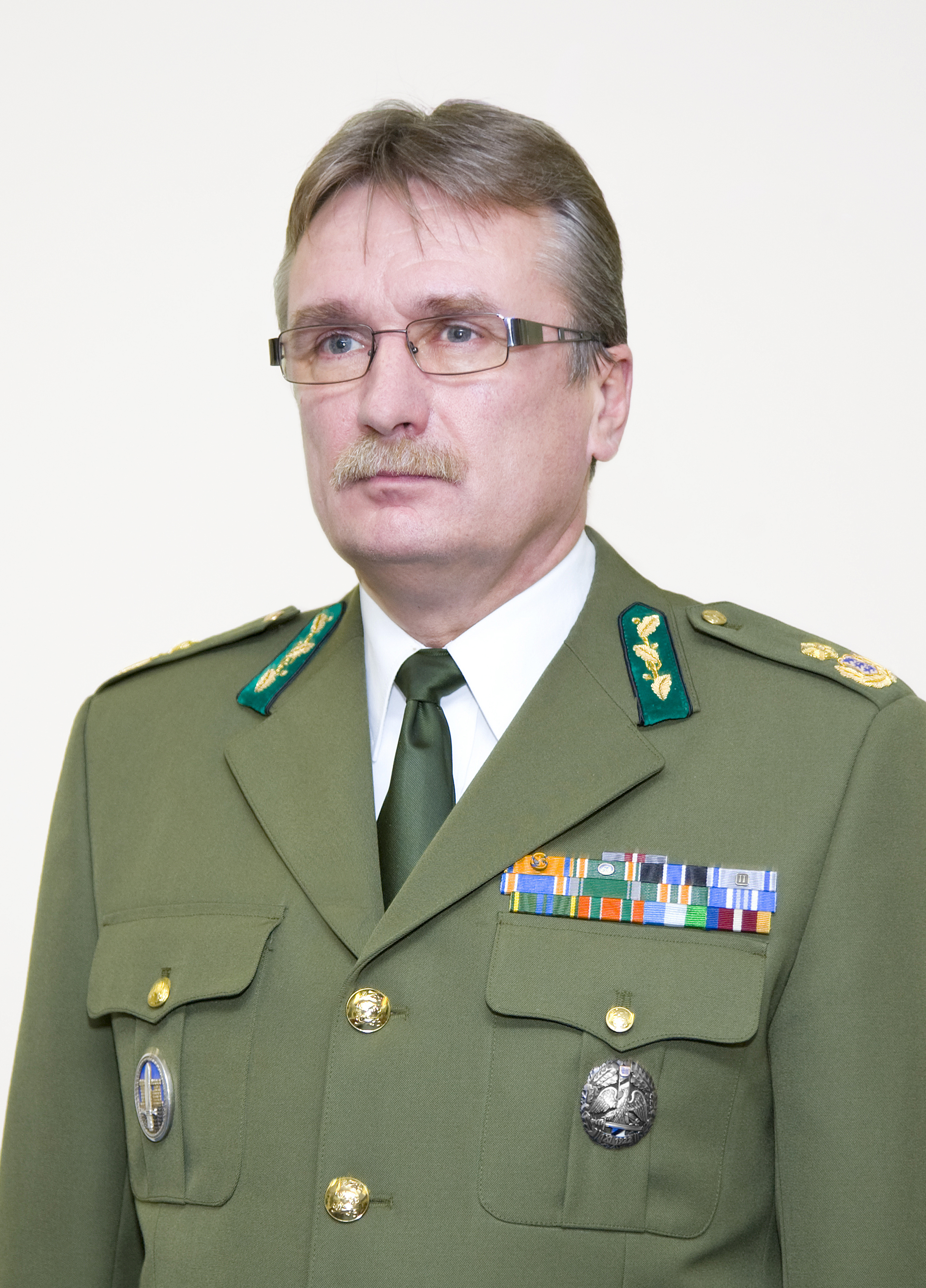 Alates 2005. aasta sügisest hakkas piirivalvet juhtima kolonelleitnant Roland Peets.